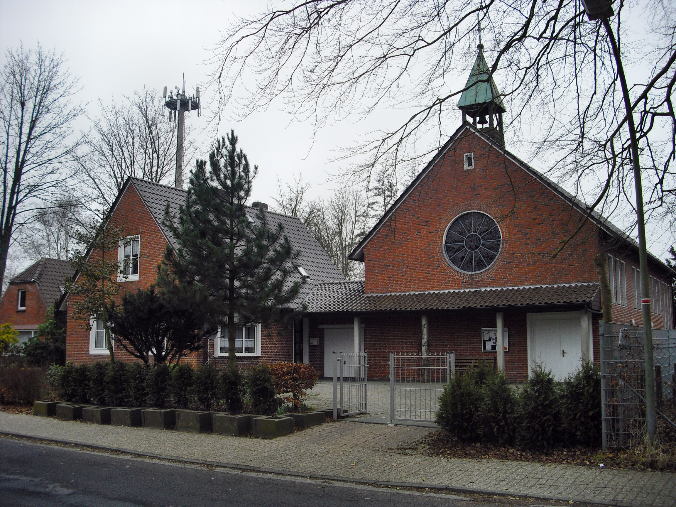 Roman-Catholic Church Saint Wiho, Hage (East Frisia), Germany